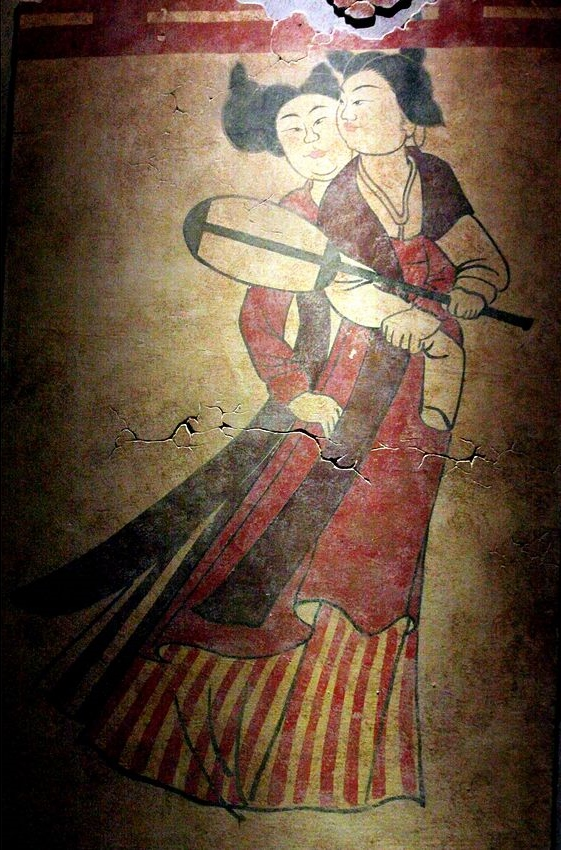 中文（香港）: 唐朝墓室壁畫